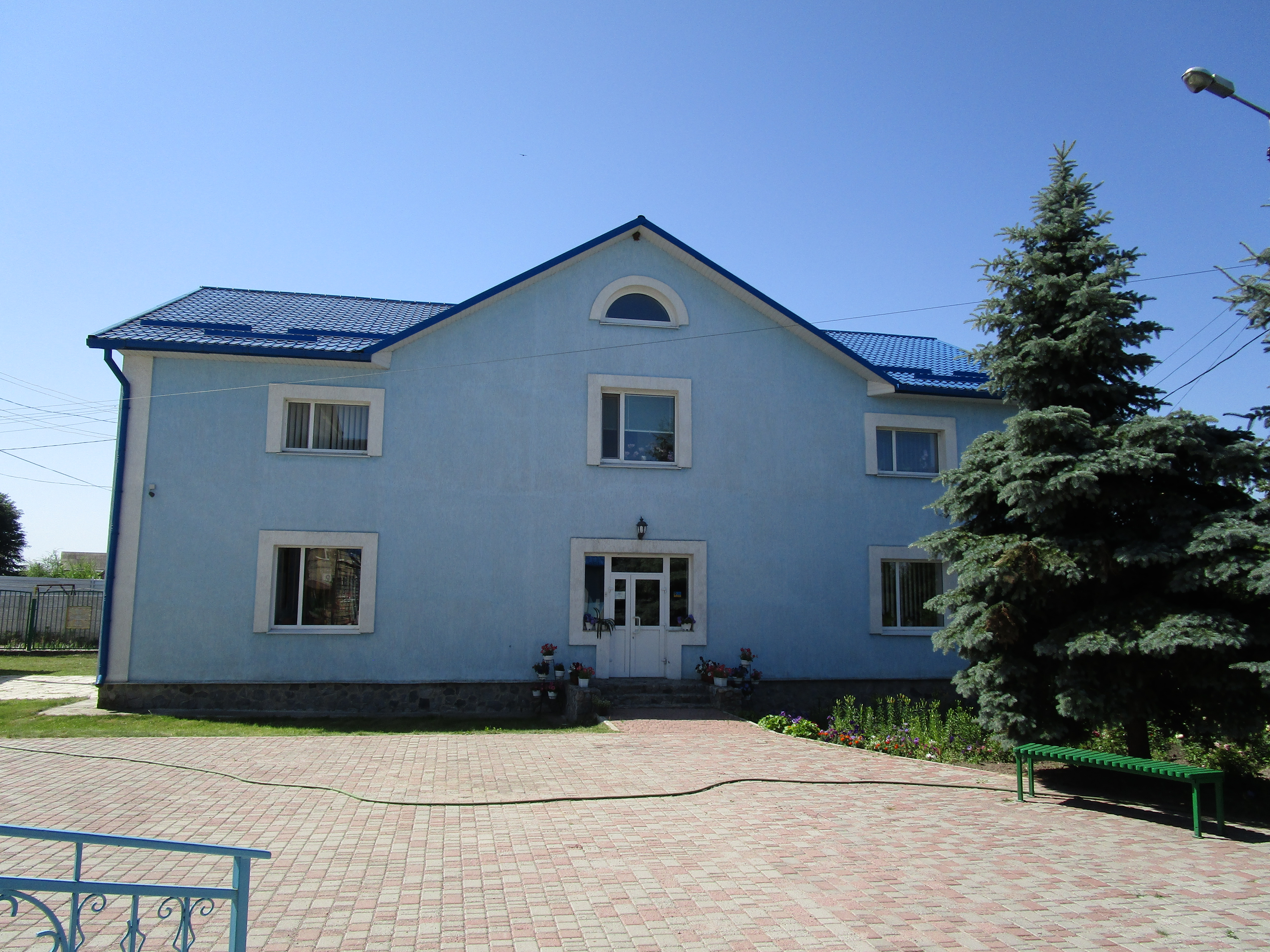 Будівля недільної школи Храму Різдва Пресвятої Богородиці